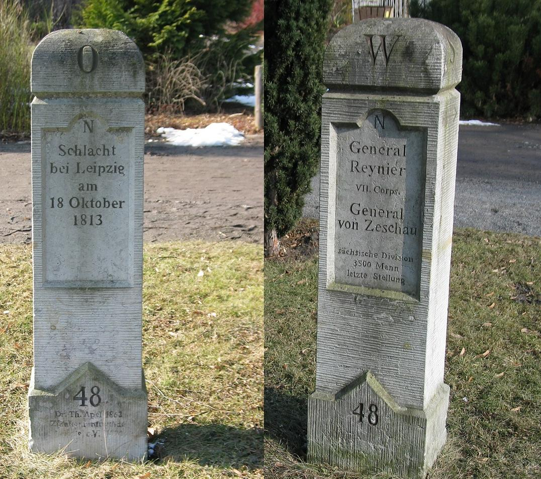 Der Apelstein Nr. 48 als Erinnerung an die Völkerschlacht bei Leipzig